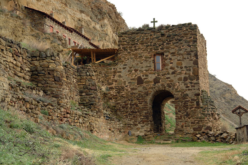 Natlismtsemeli Monastery Georgia